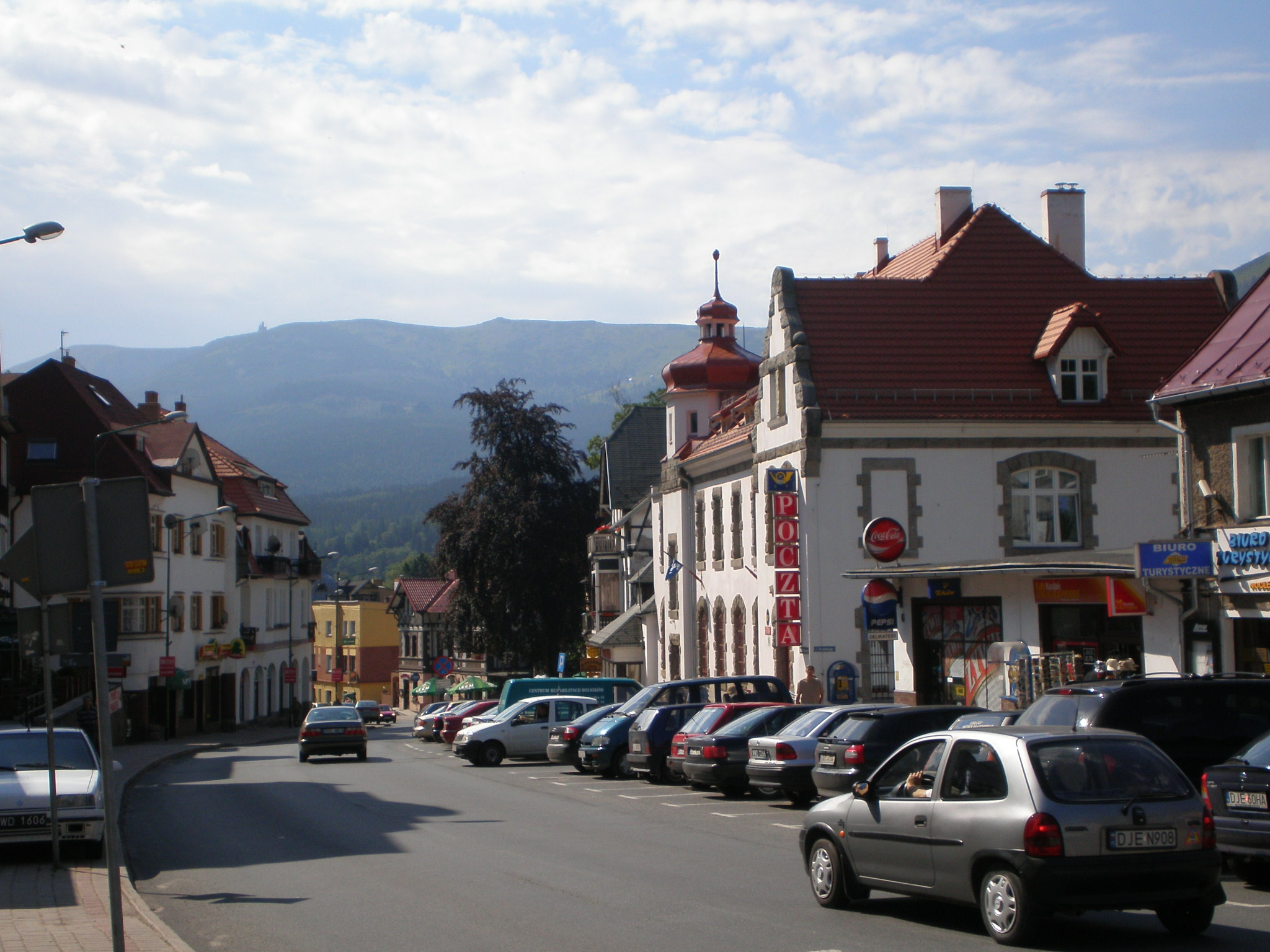 Główna ulica w Szklarskiej Porębie.